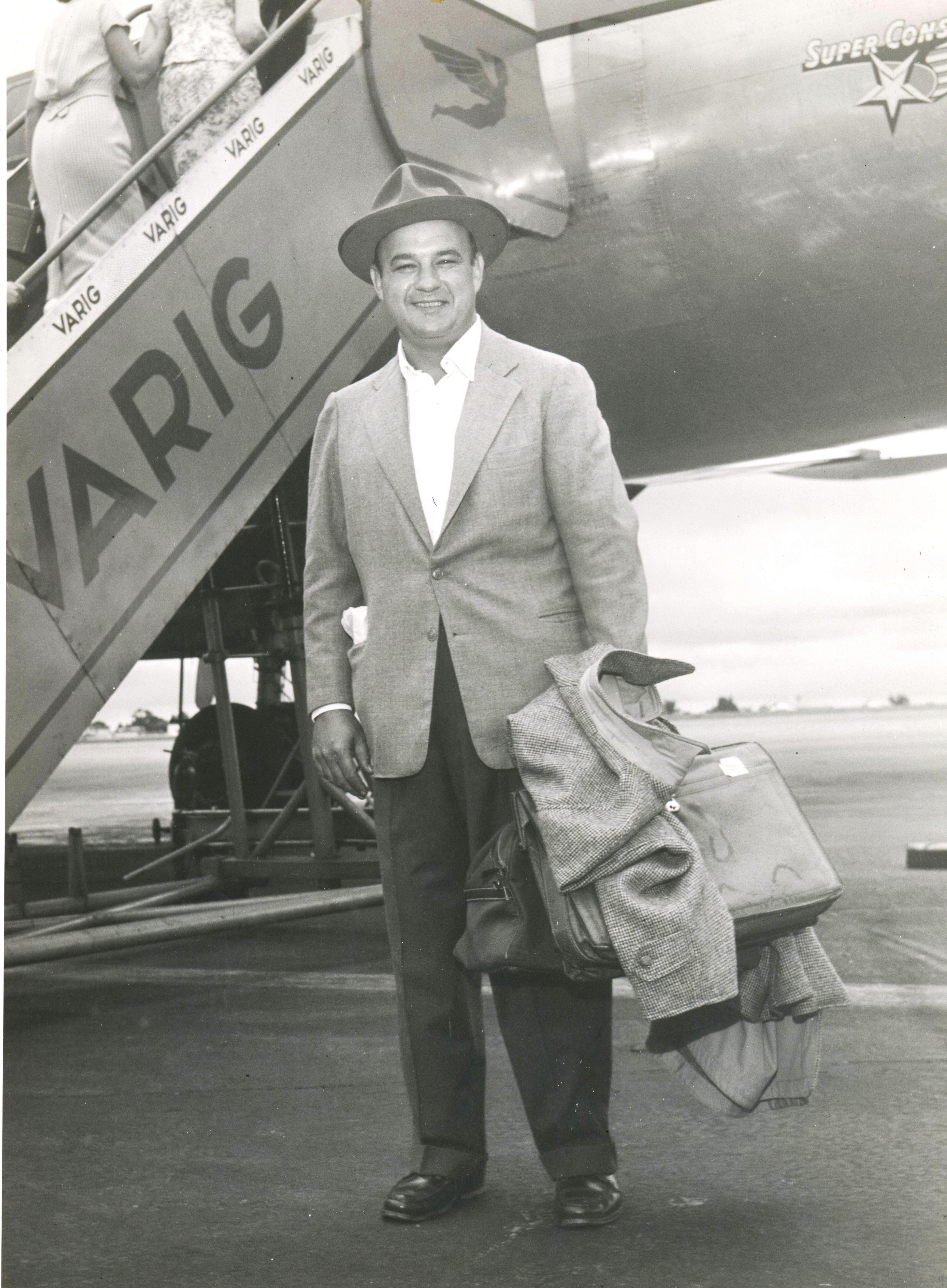 Foto de Pery Igel